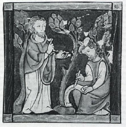 Cycle du Lancelot-Graal, manuscrit de Bonn. Hill Monastic Manuscript Library, Collegeville, Minnesota.